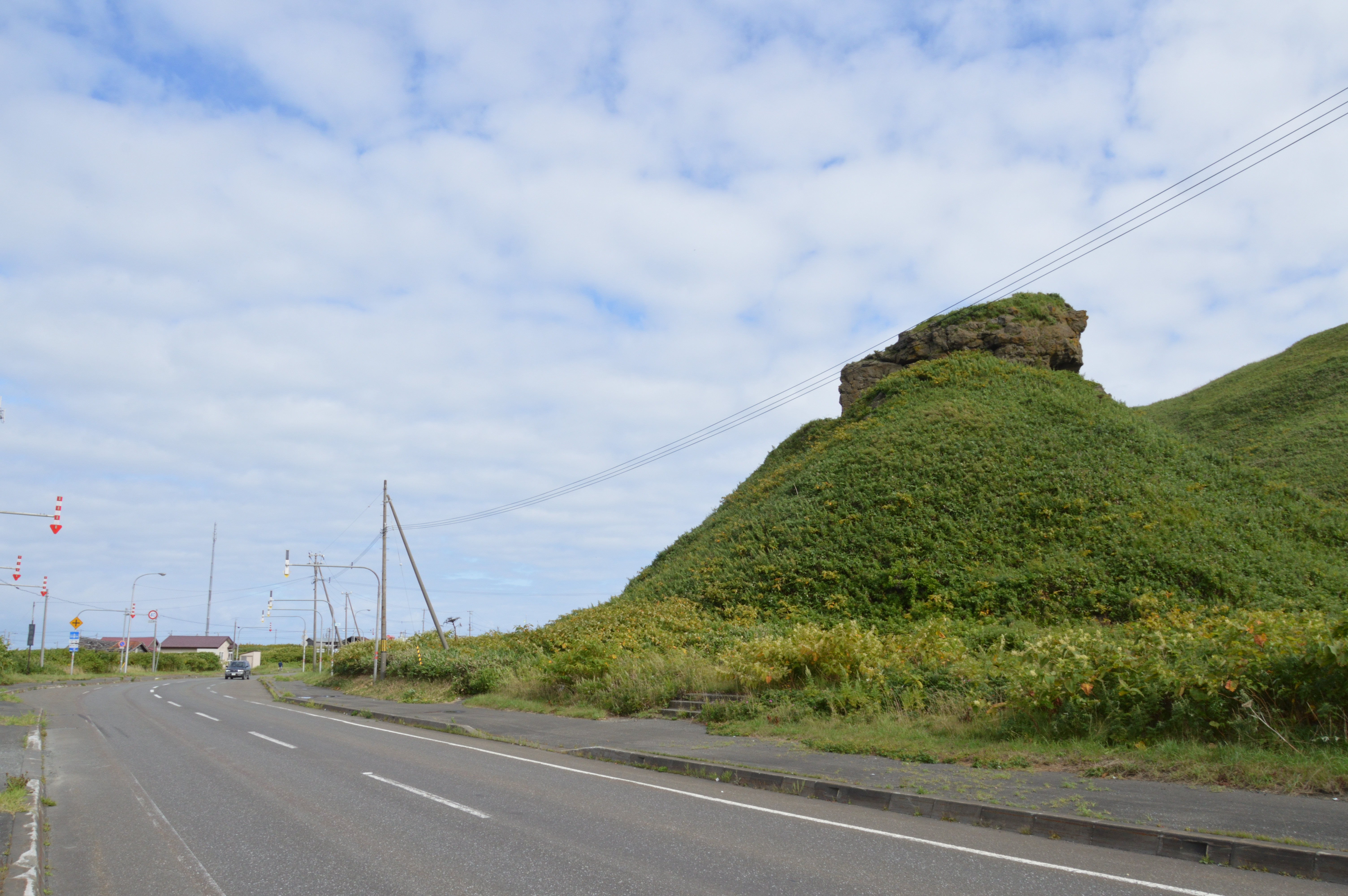 抜海岩と道道106号稚内天塩線（北海道稚内市抜海村字バッカイ）。 Nikon D3200